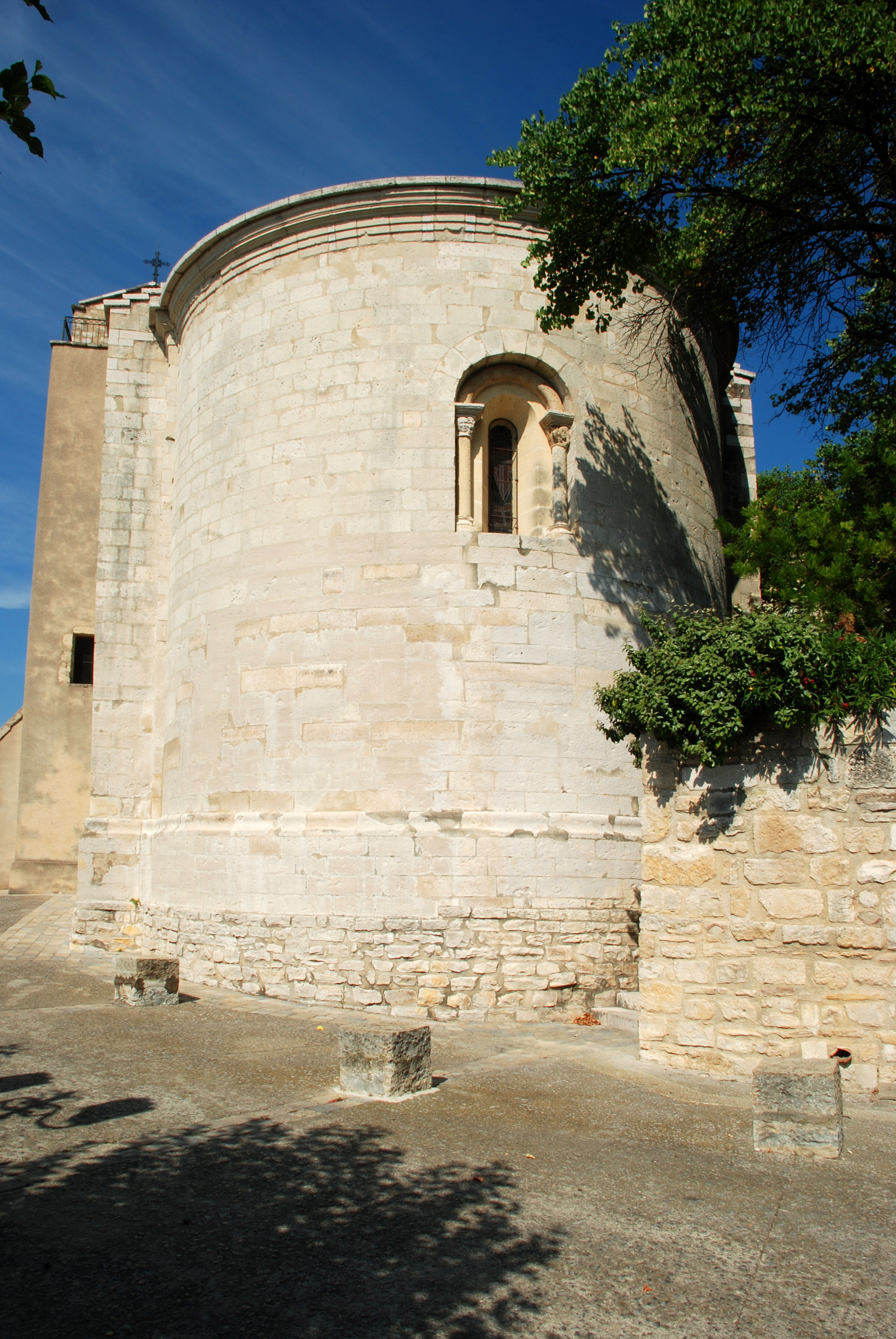 France - Languedoc - Hérault - Église Saint-Martial d'Assas